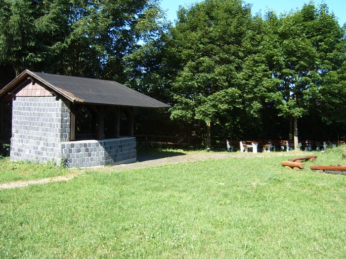 Sudheimer Grillplatz